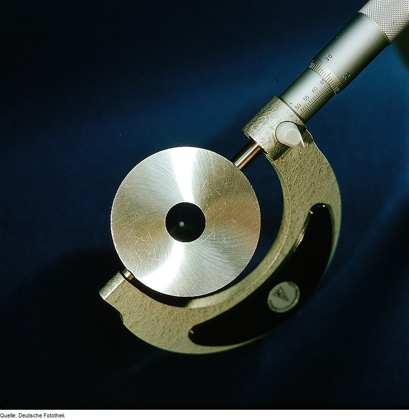 Original image description from the Deutsche Fotothek Mikrometerschraube